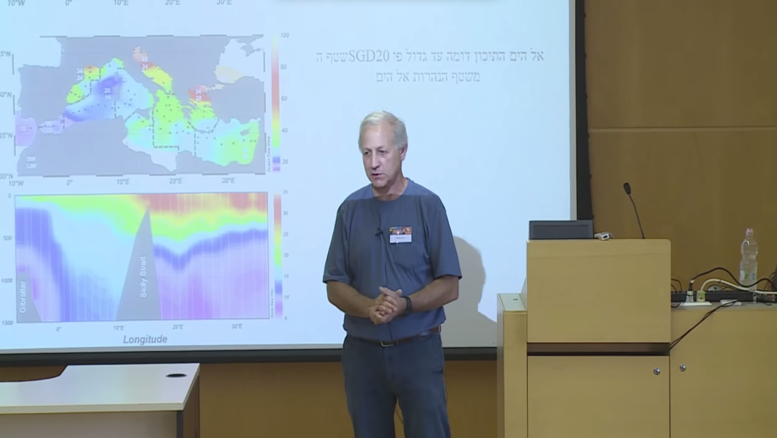 הרצאה ב"ליל המדענים", אוניברסיטת בר אילן